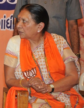 Narendra Modi and Anandiben Patel attending BJP MLAs meeting.